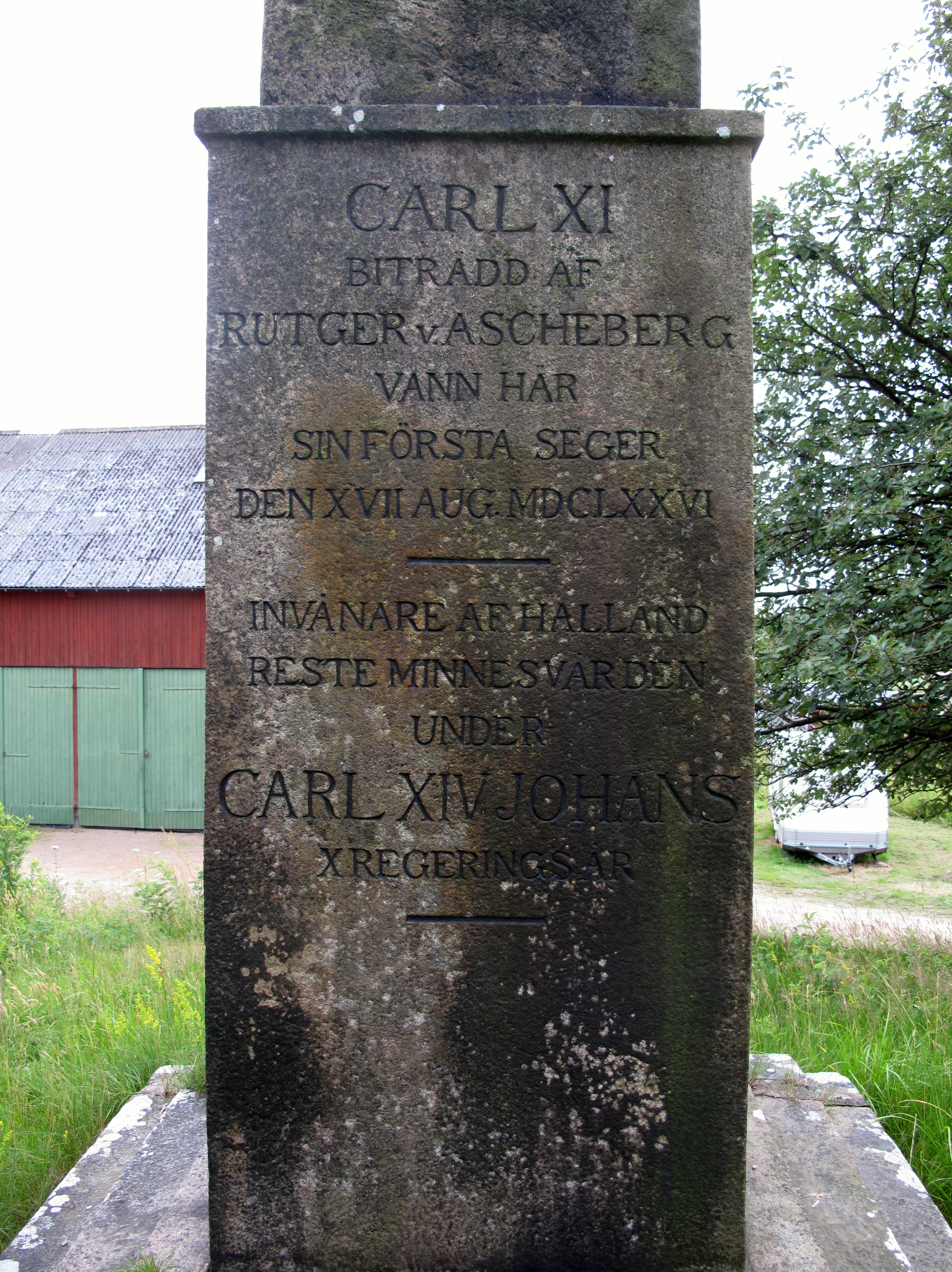 Monument över slaget vid Fyllebro (RAÄ-nummer Snöstorp 27:2) i Fyllinge, Snöstorps socken, Tönnersjö härad, Halmstads kommun, Hallands län, Halland, Sverige.